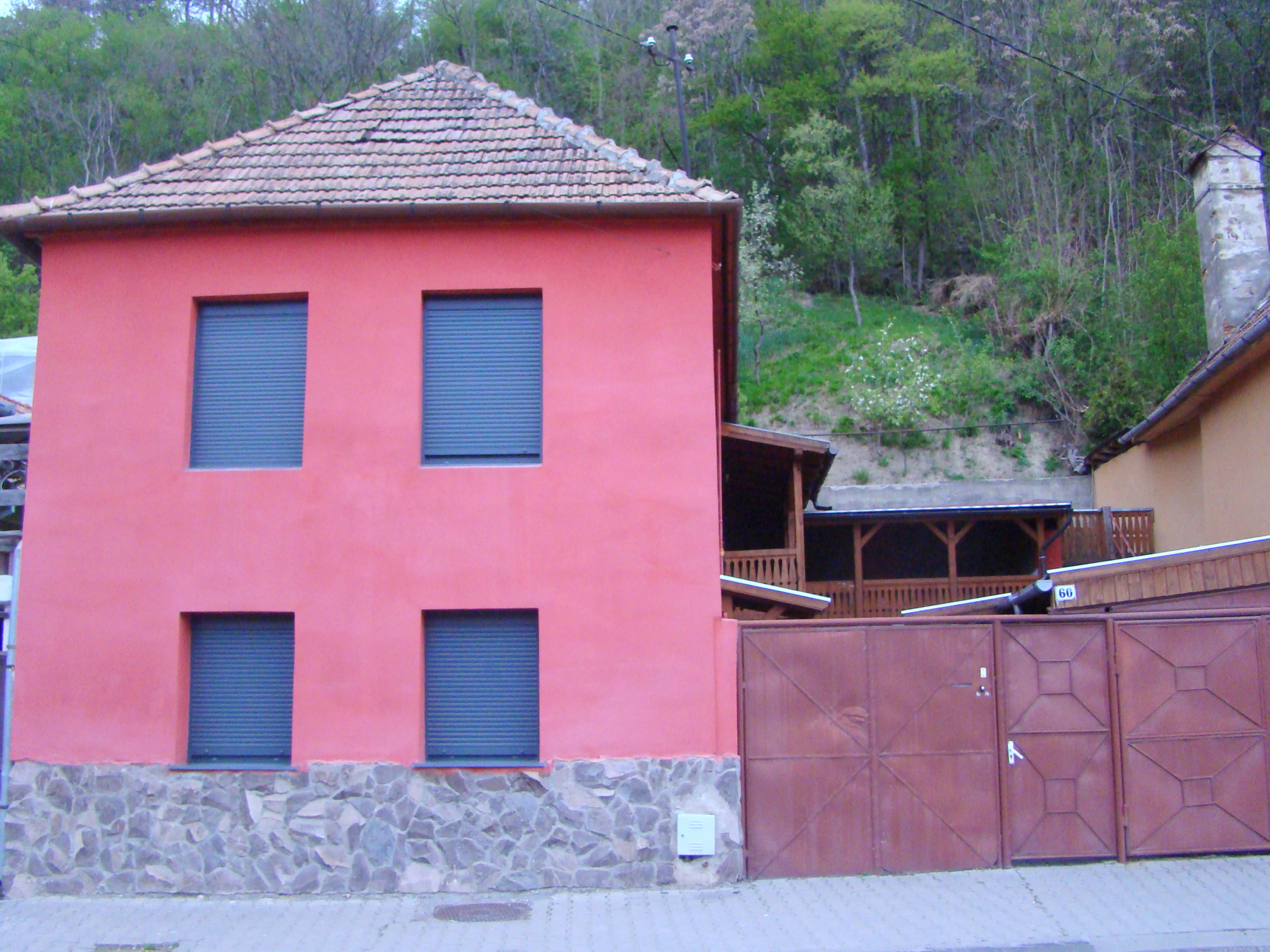 Casă, municipiul Sighișoara, str. Chendi Ilarie 60 sec. XIX